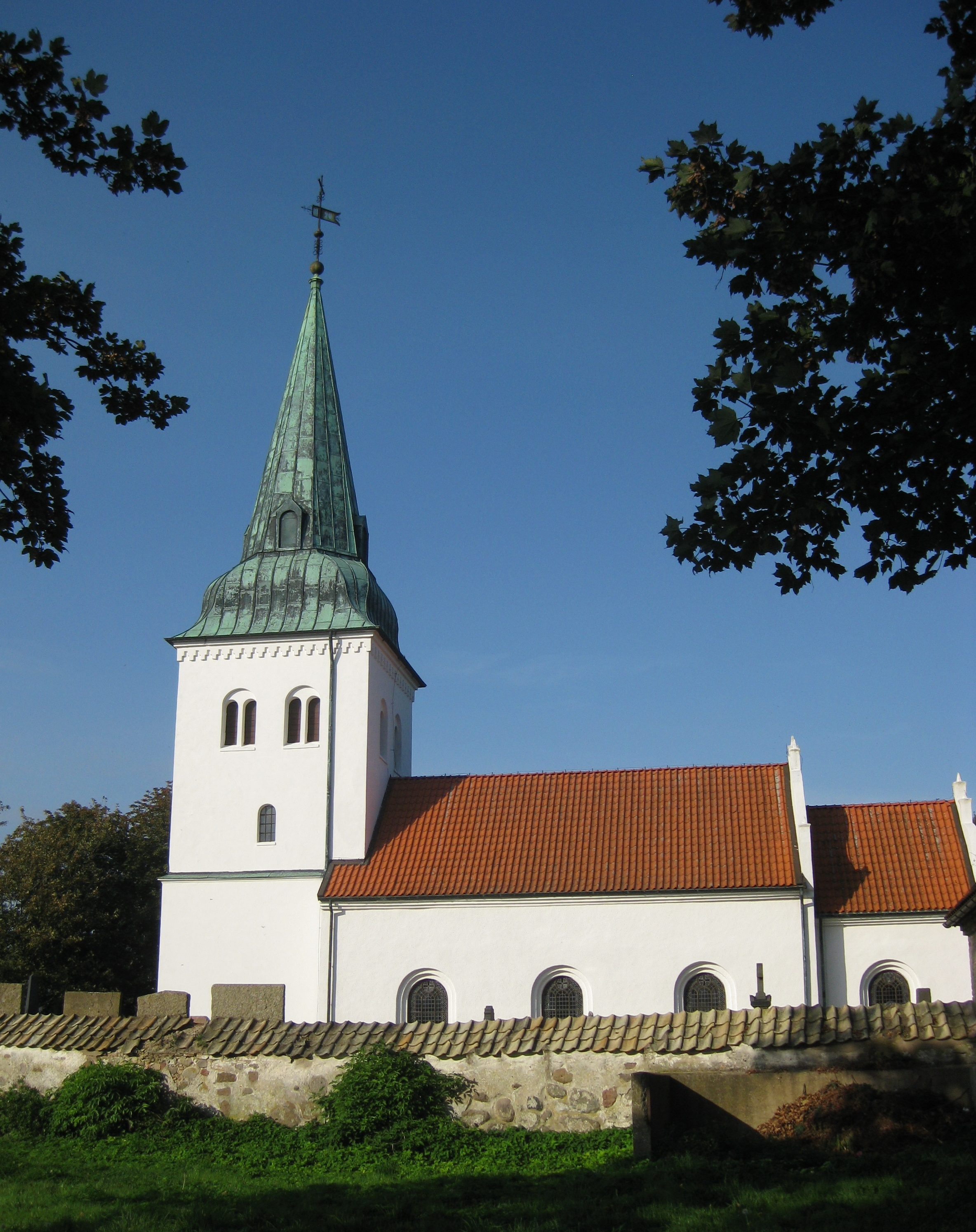 Västra Tommarps kyrka